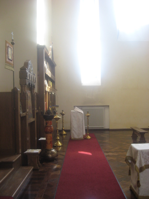 После ремонта (2010г.)